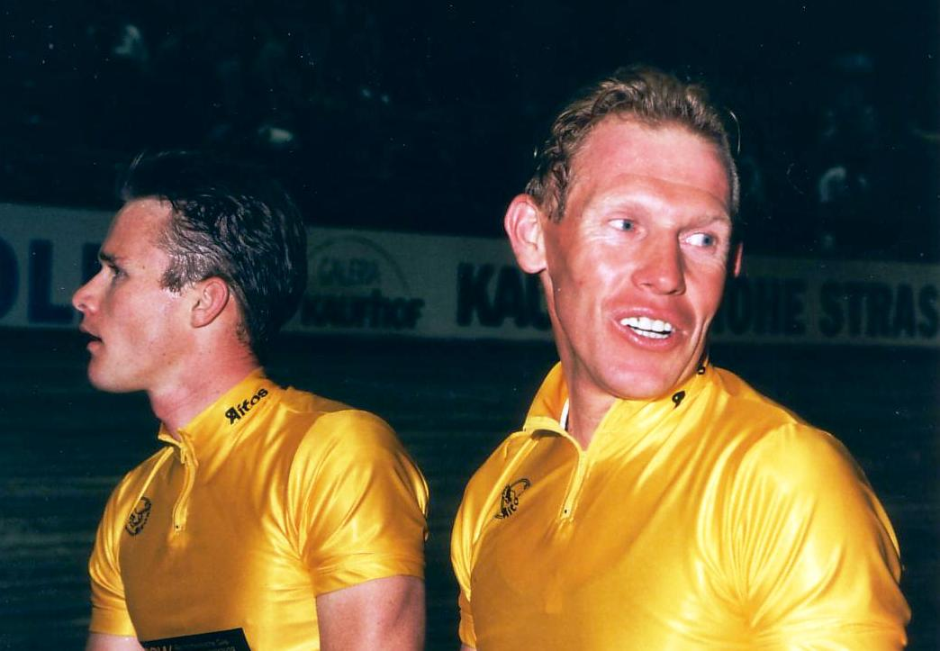 Matthew Gilmore (l.), belgischer Radsportler, Etienne de Wilde, belgischer Radsportler